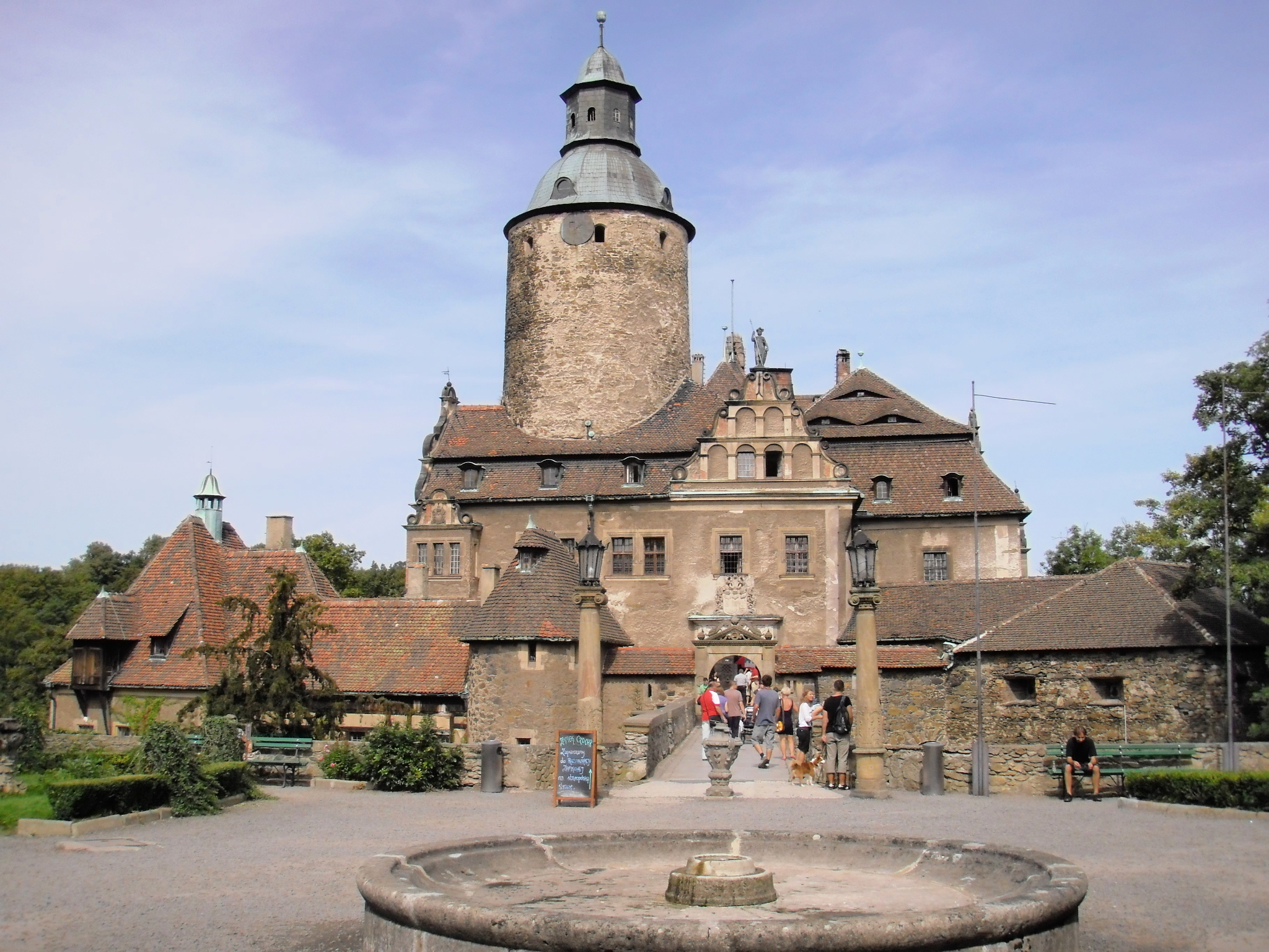 Sucha, zamek, XV, XIX